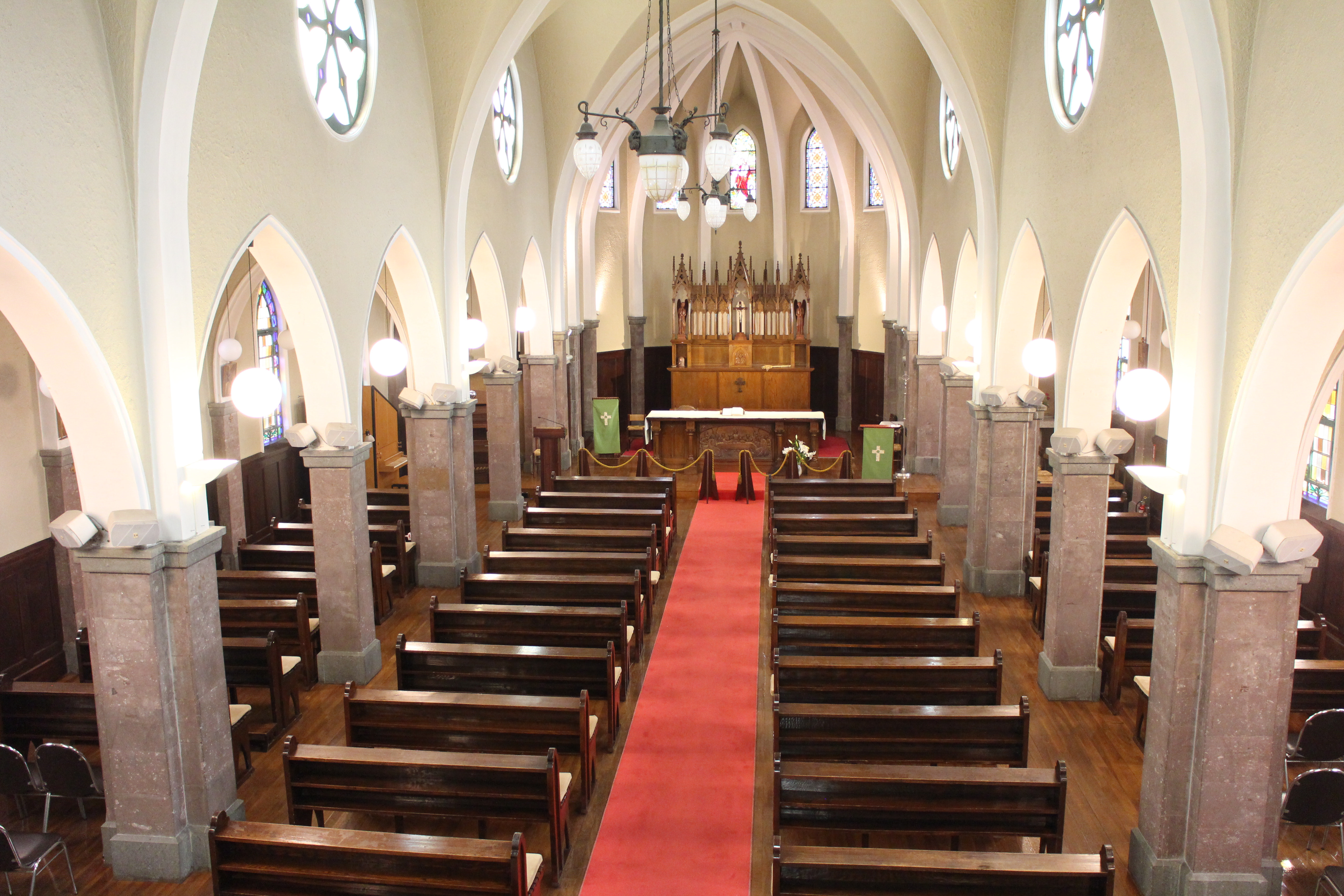 前橋カトリック教会の内部情景。